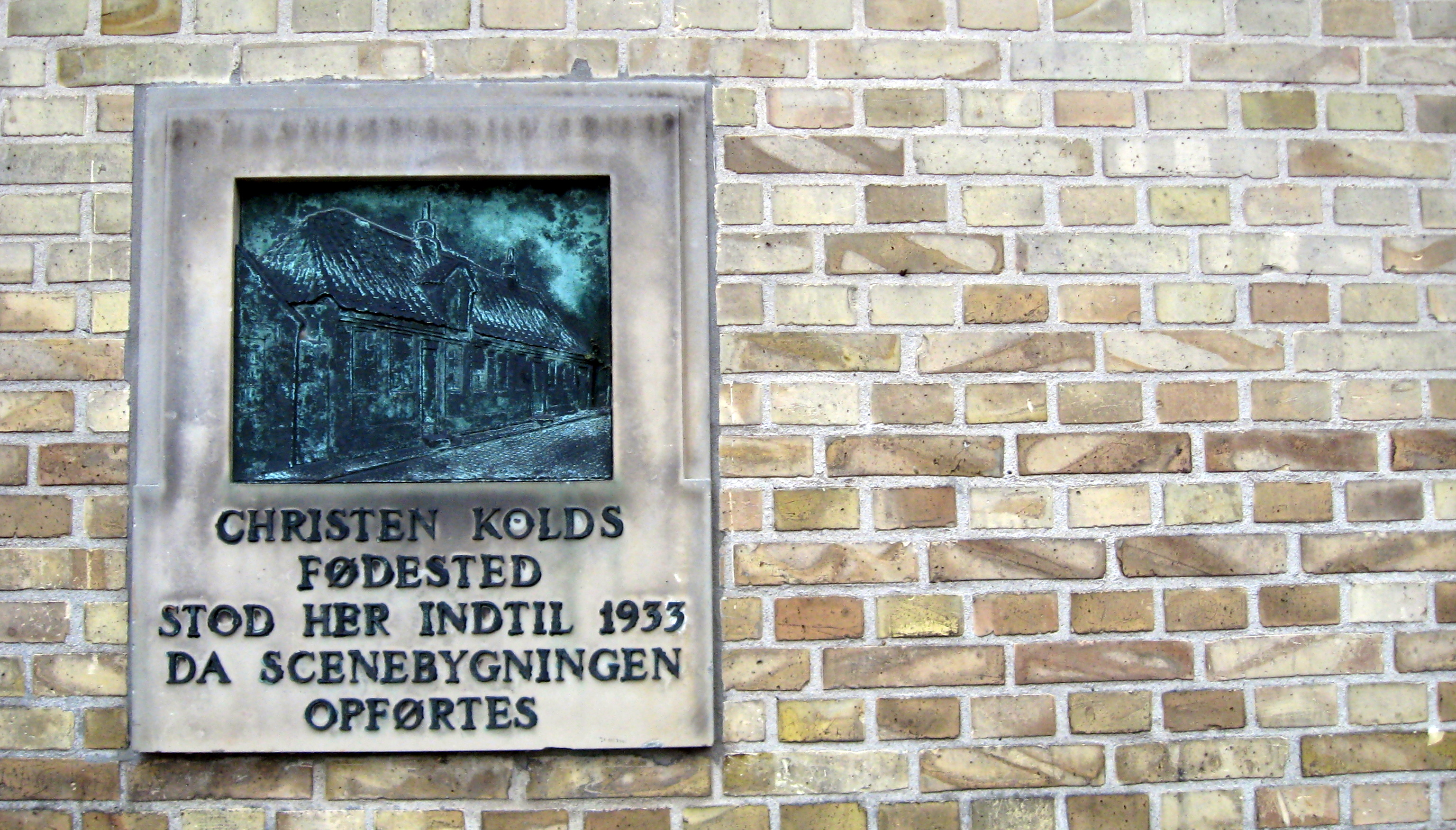 Christen Kold, en dansk lærer, der var en pioner indenfor højskole- og friskolebevægelsen. Mindetavle i Thisted